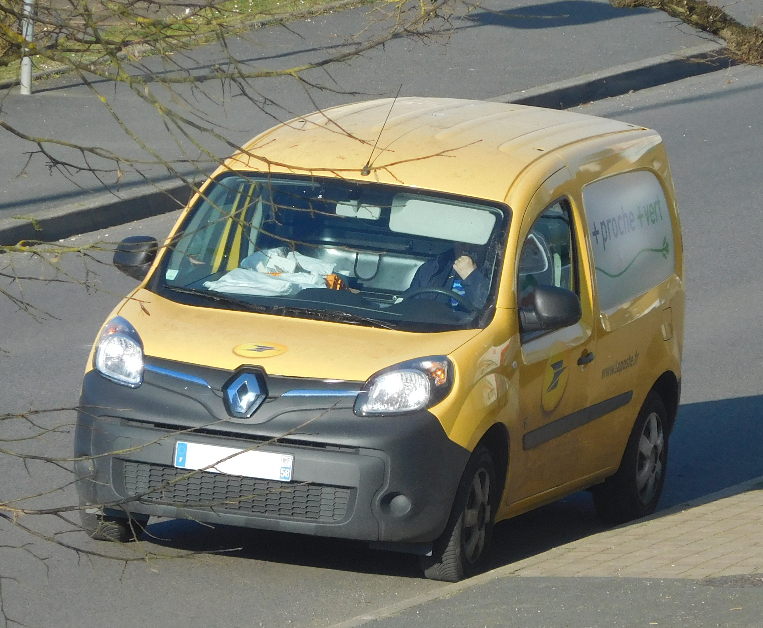 Renault Kangoo ZE de La Poste.